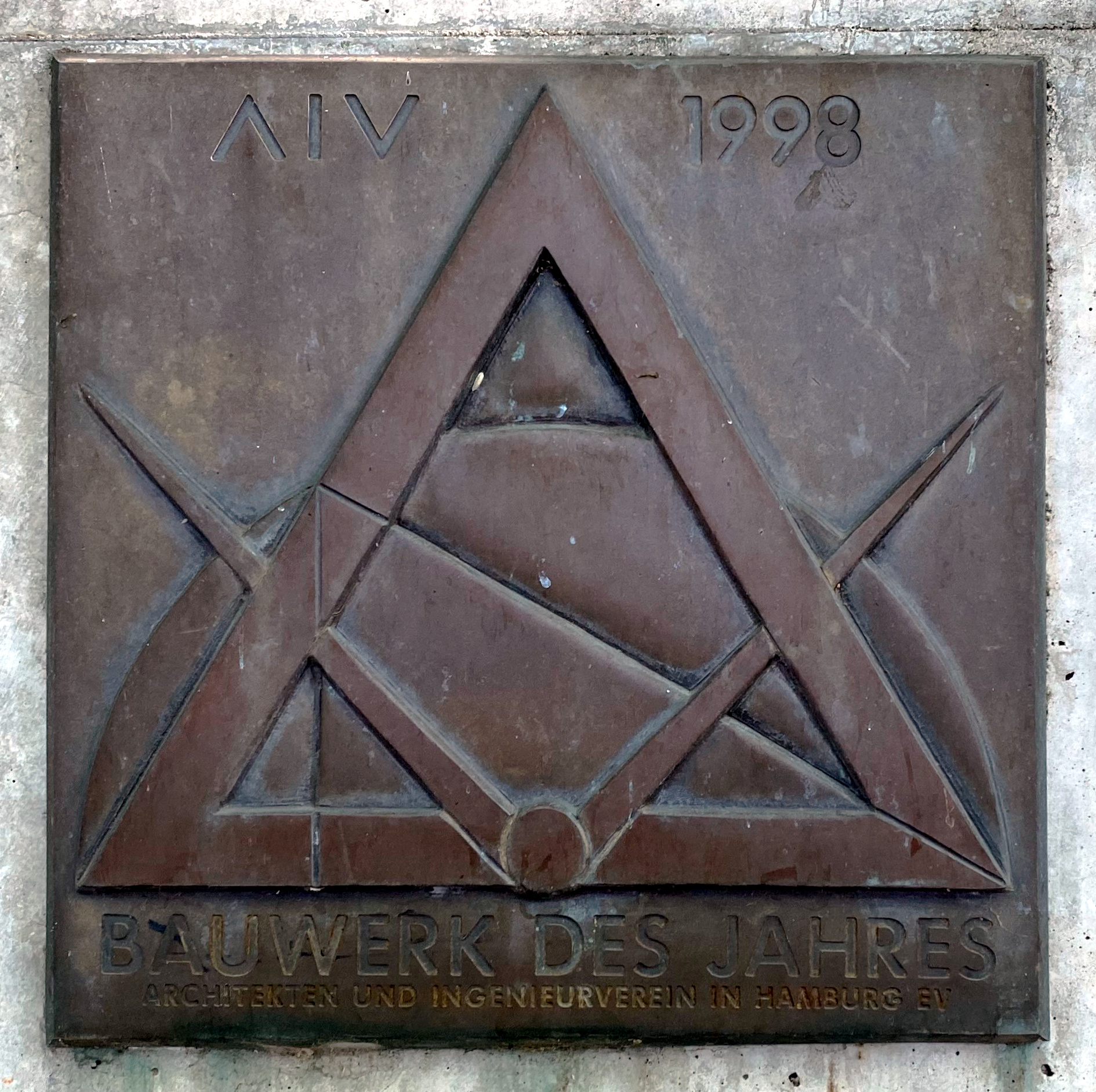 AIV-Plakette "Bauwerk des Jahres" am Turmweg 17, Hamburg-Rotherbaum, vergeben 1998. "Bauwerk des Jahres" ist eine jährlich vergebene Architektur-Auszeichnung des Architekten- und Ingenieurvereins Hamburg (AIV Hamburg). Die Bronze-Plakette wurde von Thomas Darboven gestaltet.